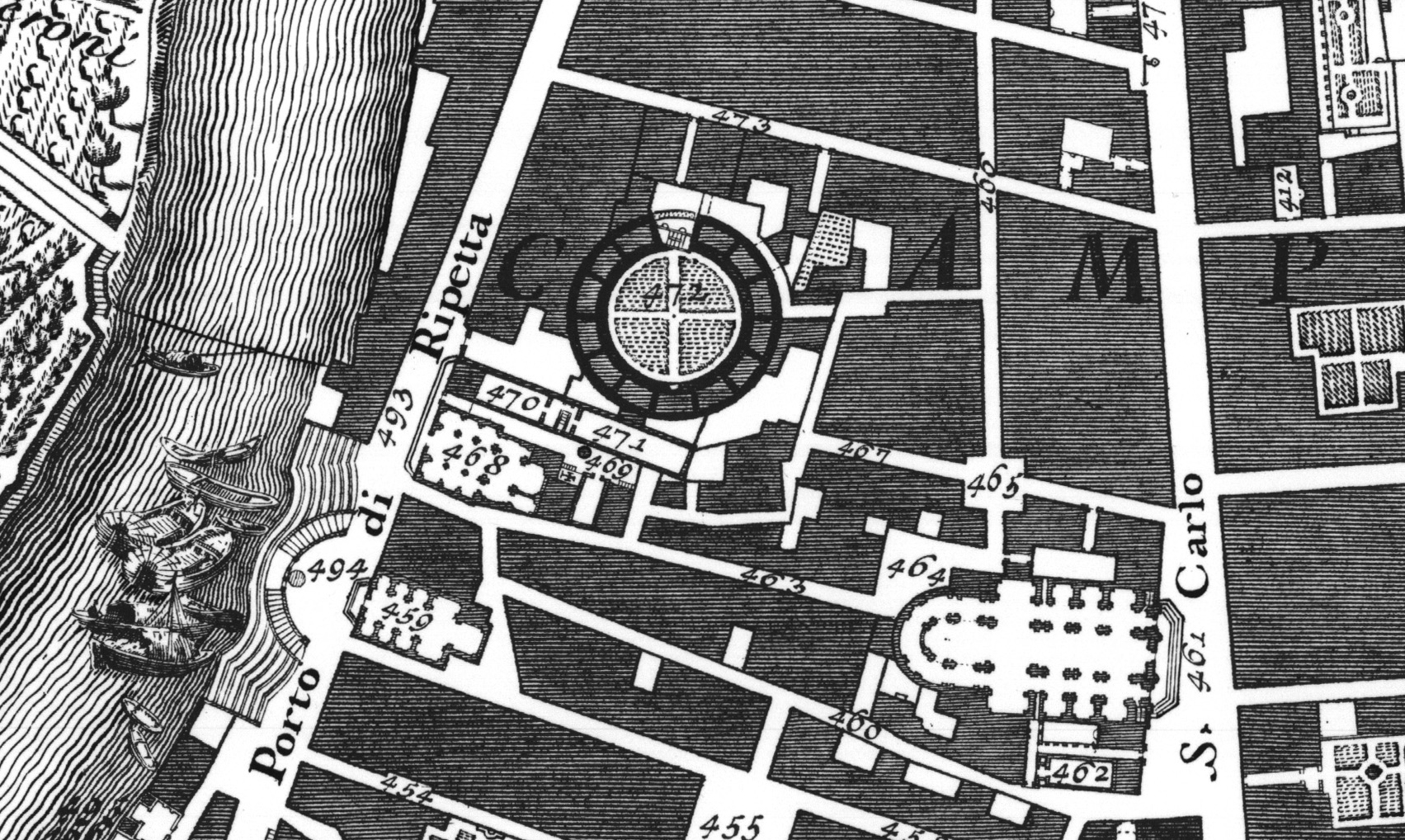 Roma, la zona di Schiavonia (tra il porto di Ripetta e il Mausoleo di Augusto) a metà del Settecento (da Nolli, Nuova Topografia di Roma, 1748). Al centro, il mausoleo di Augusto. Particolare dal foglio 2.